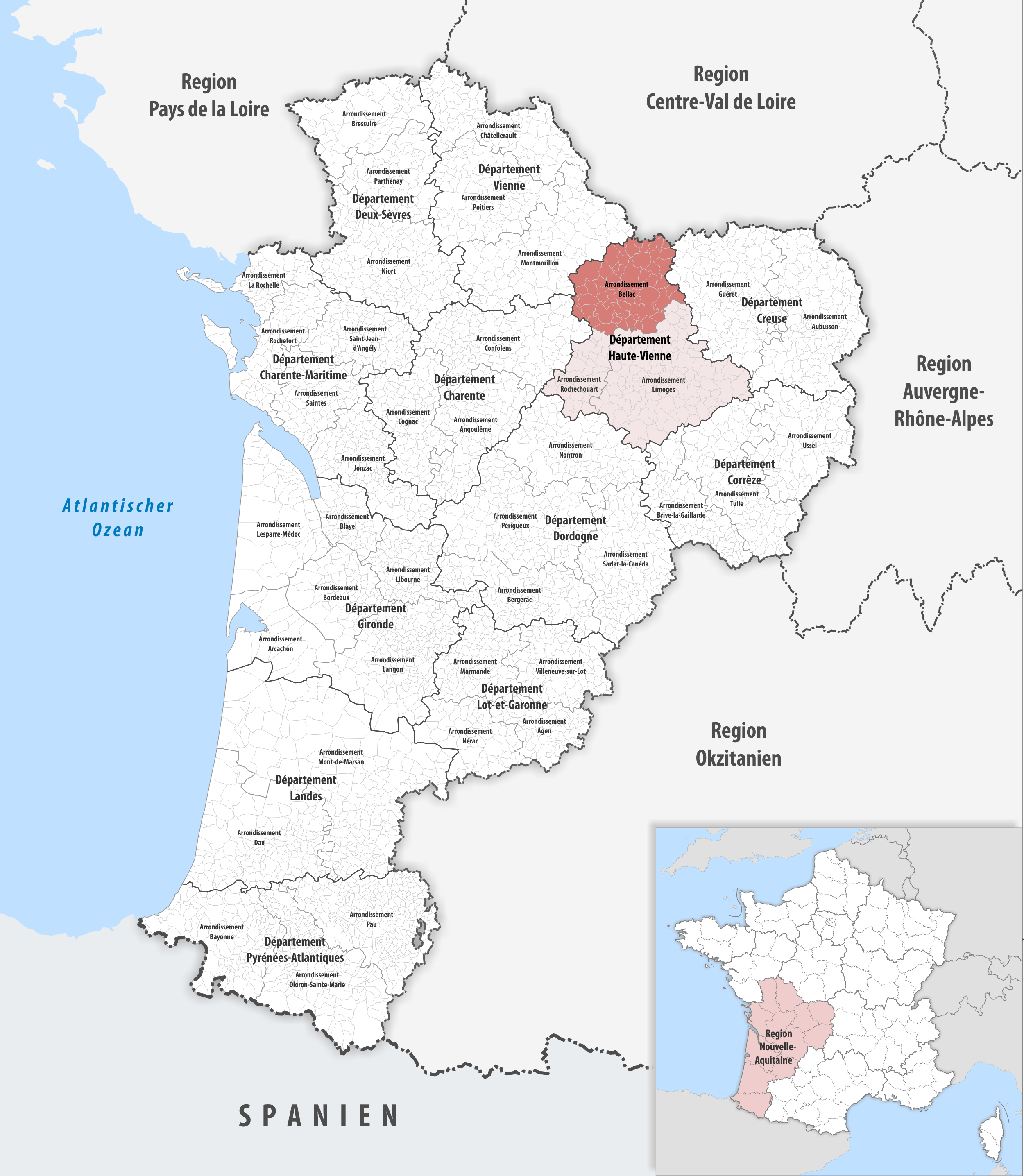 Lage des Arrondissements Bellac